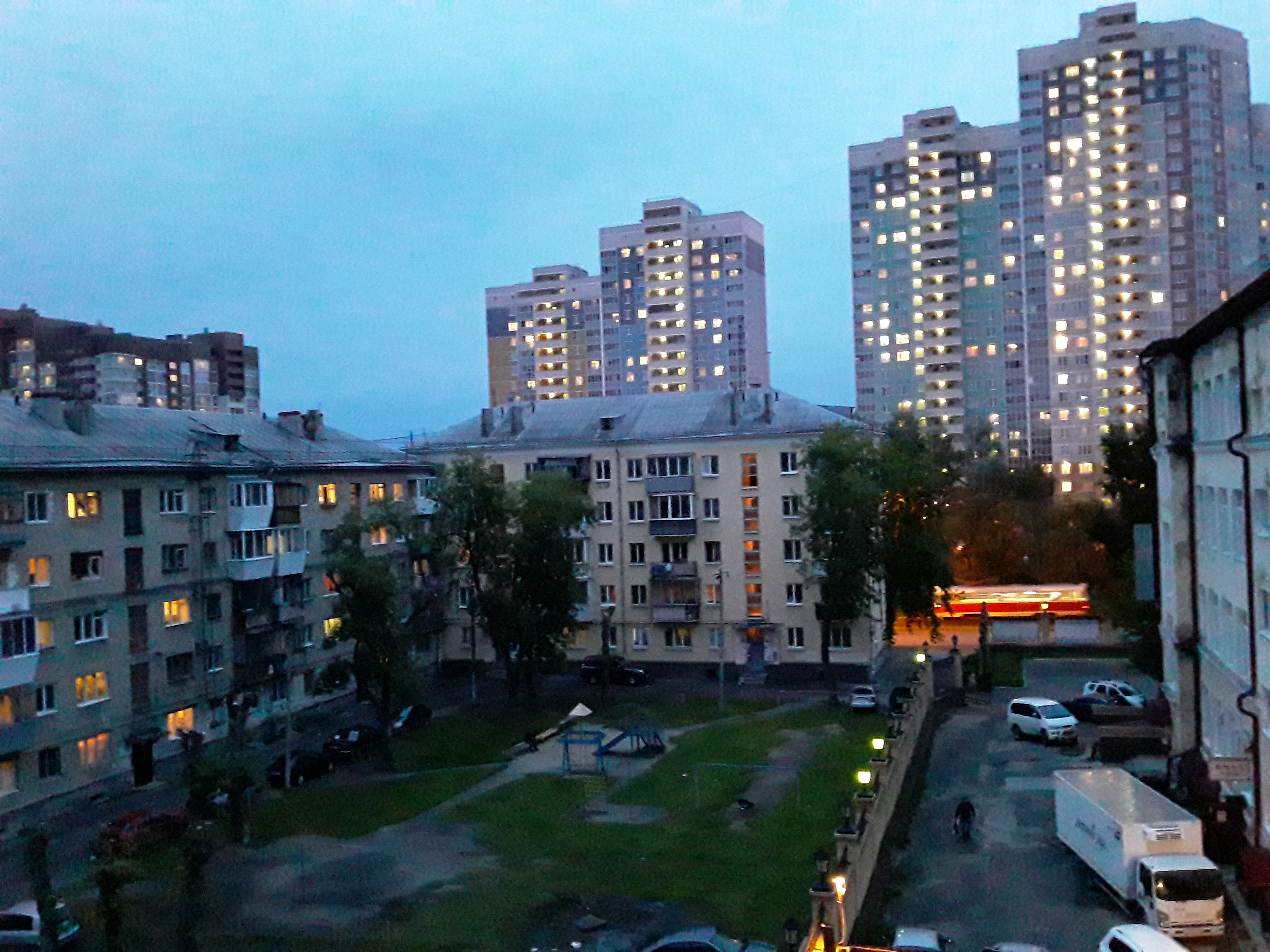 Вторчермет Екатеринбург